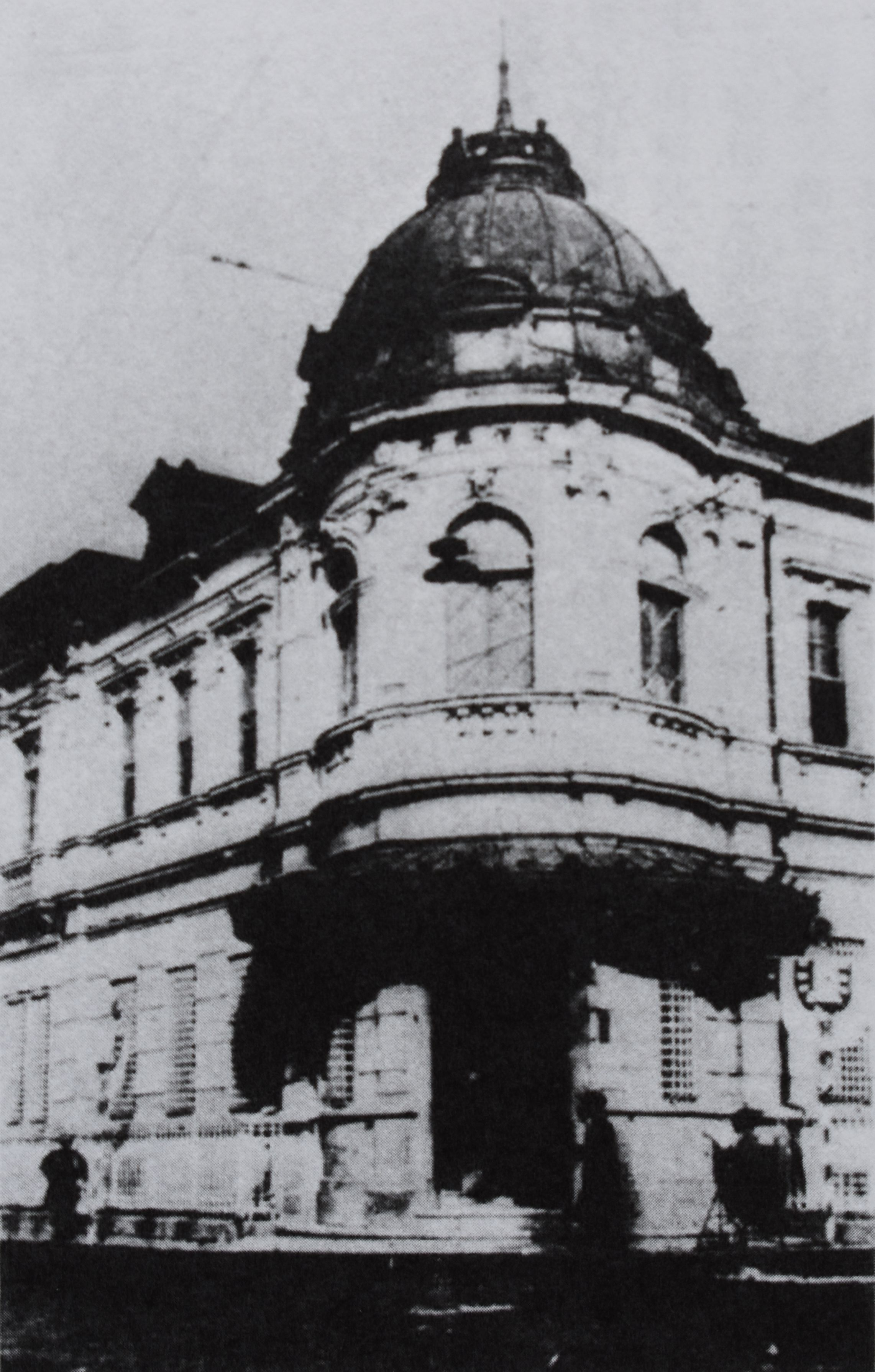 甲府市 有信銀行